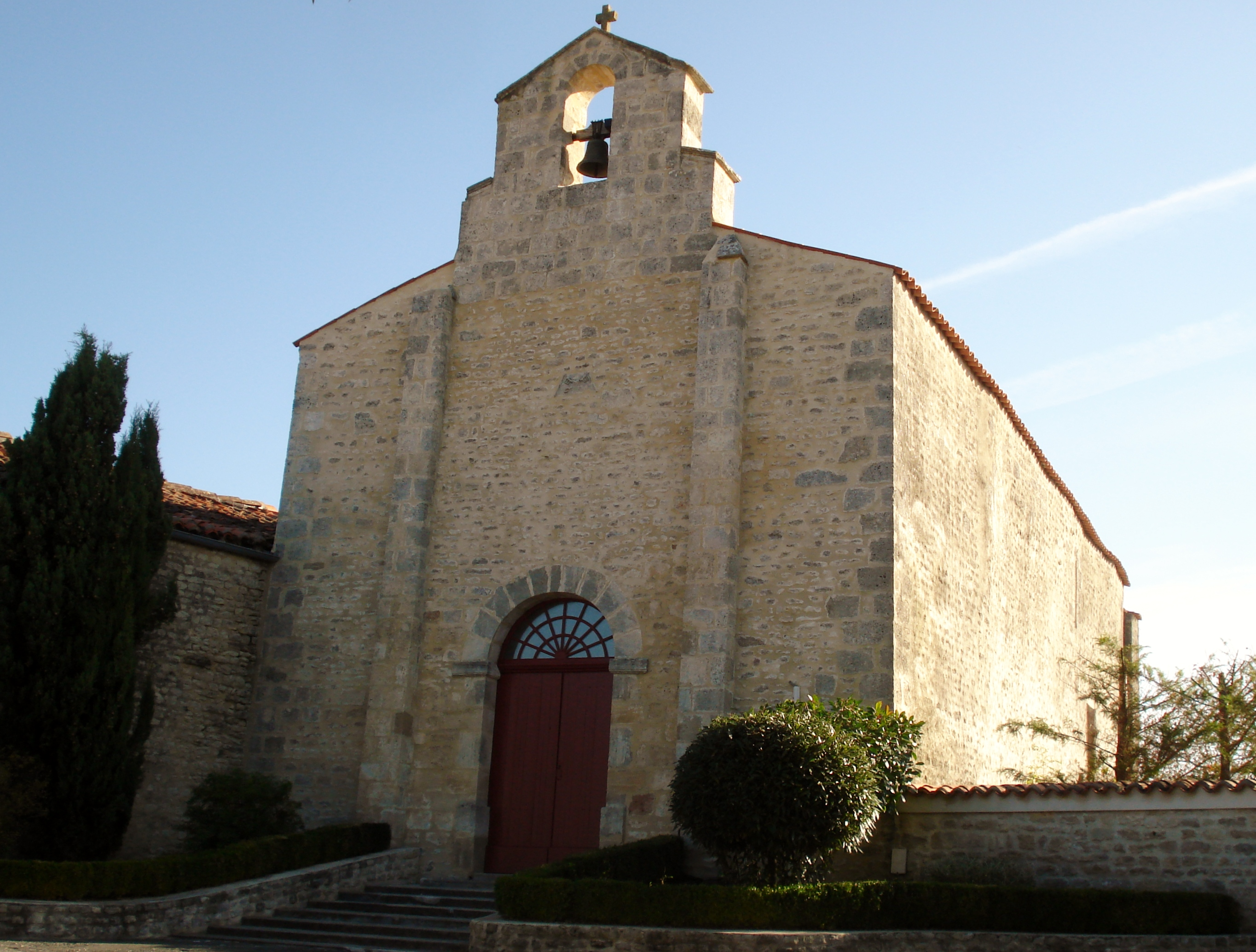 Eglise du Gicq en Charente-Maritime